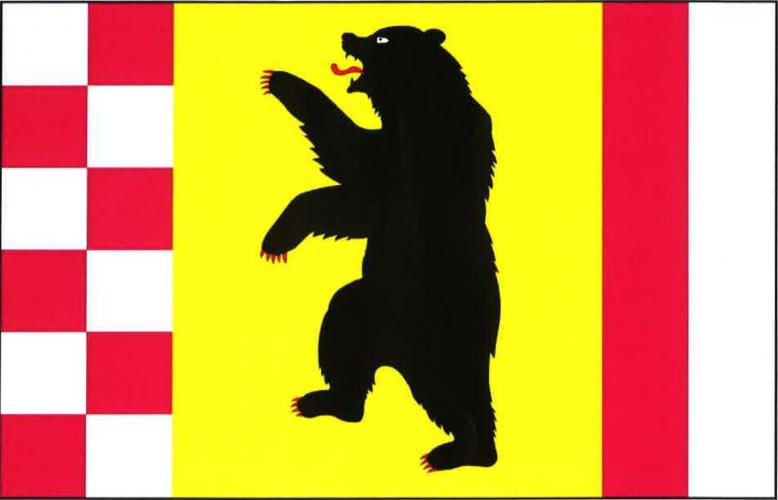 vlajka, Nedvězí, okres Svitavy